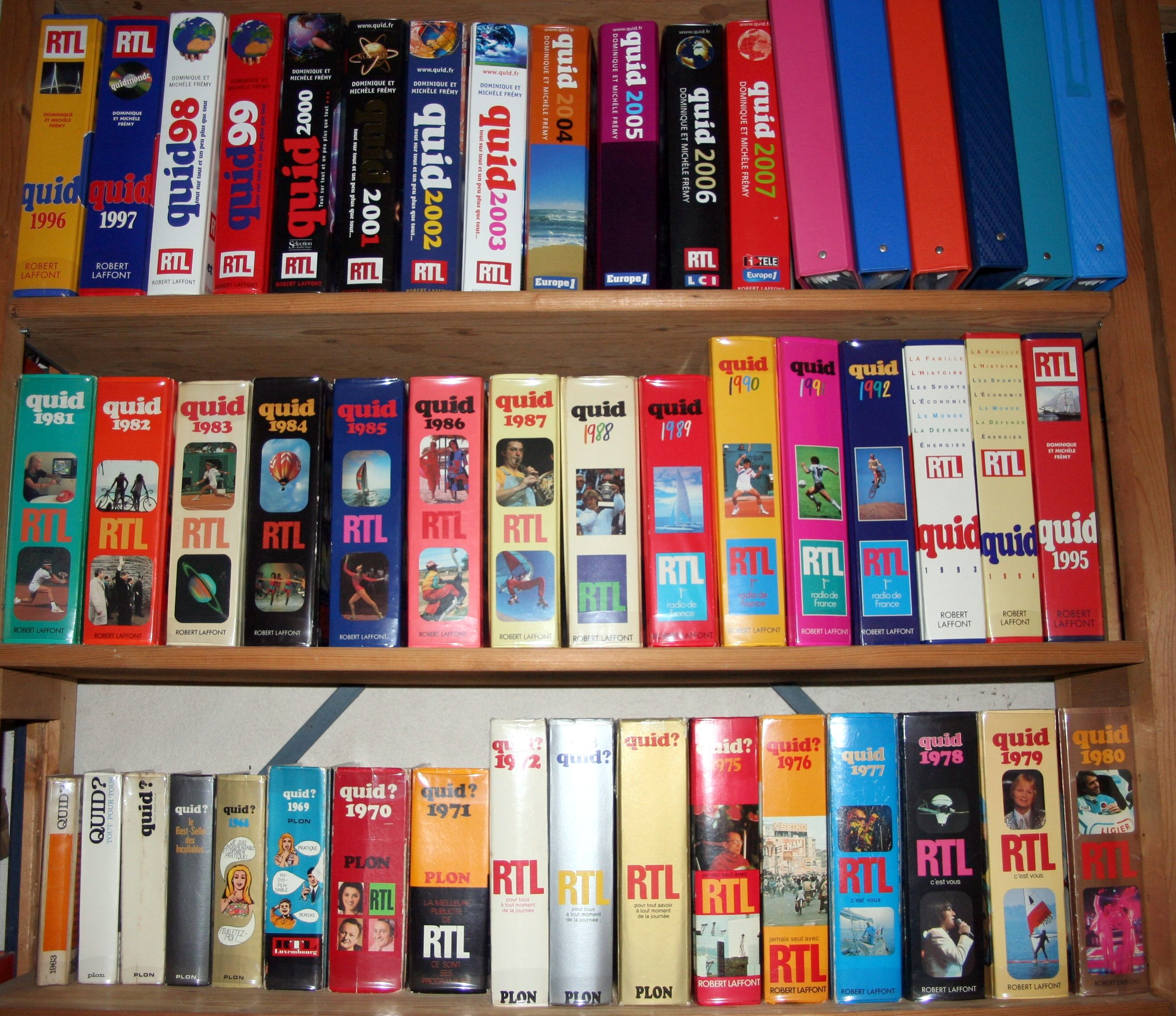 Collection Quid (encyclopédie populaire)